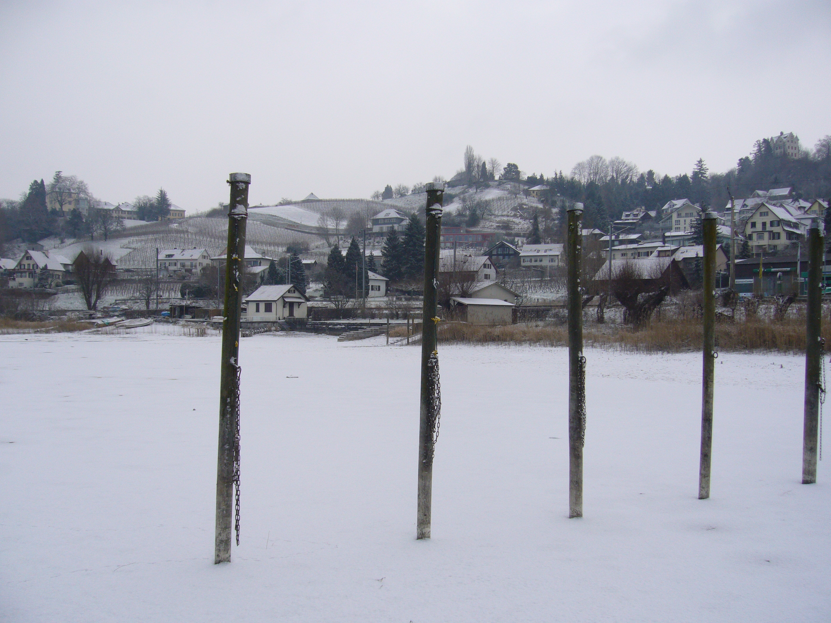 Die Schlösser Arenenberg und Salenstein in der Gemeinde Salenstein, Kanton Thurgau, Schweiz